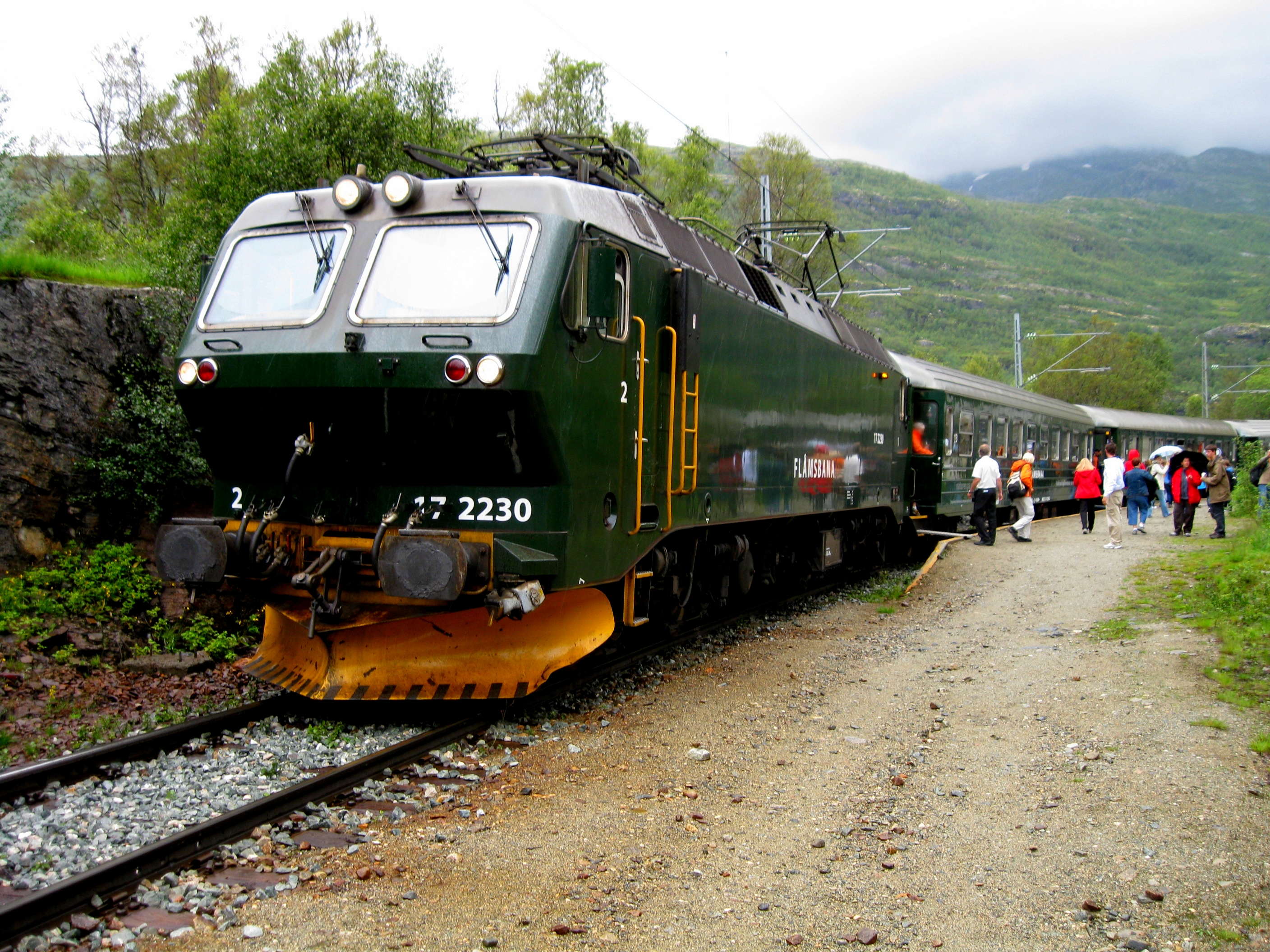 Zug Nummer 17-2230 der Flåmsbahn aufgenommen am 27. August 2010